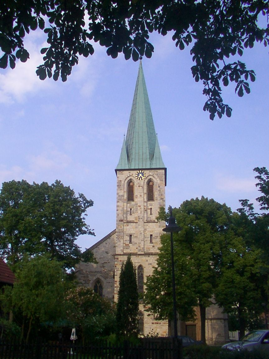 Salzkotten: Katholische Kirche Sankt Matthäus in Niederntudorf (von Westen) This is a photograph of an architectural monument.